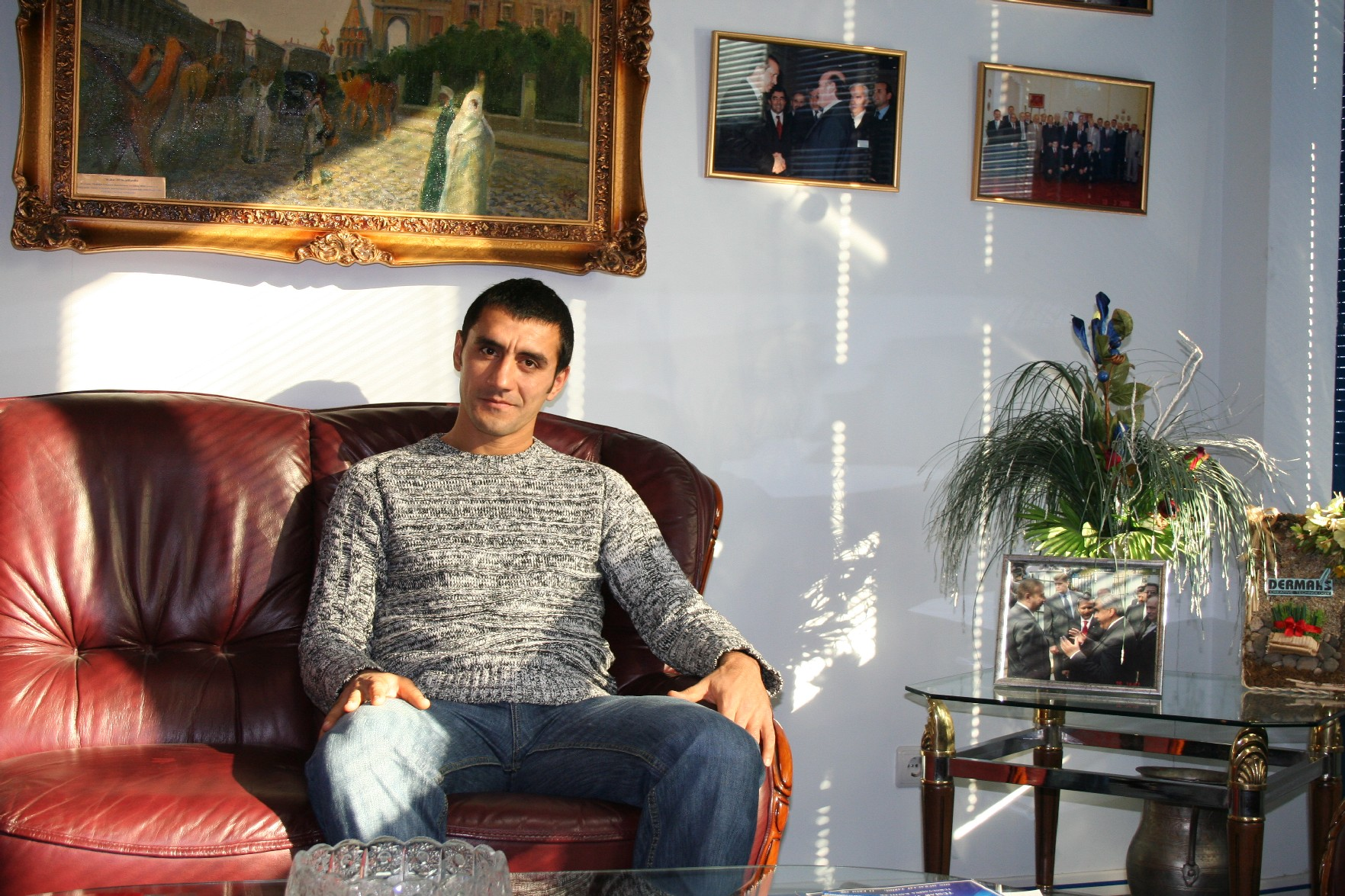 Хагани Мамедов Форвард Интер